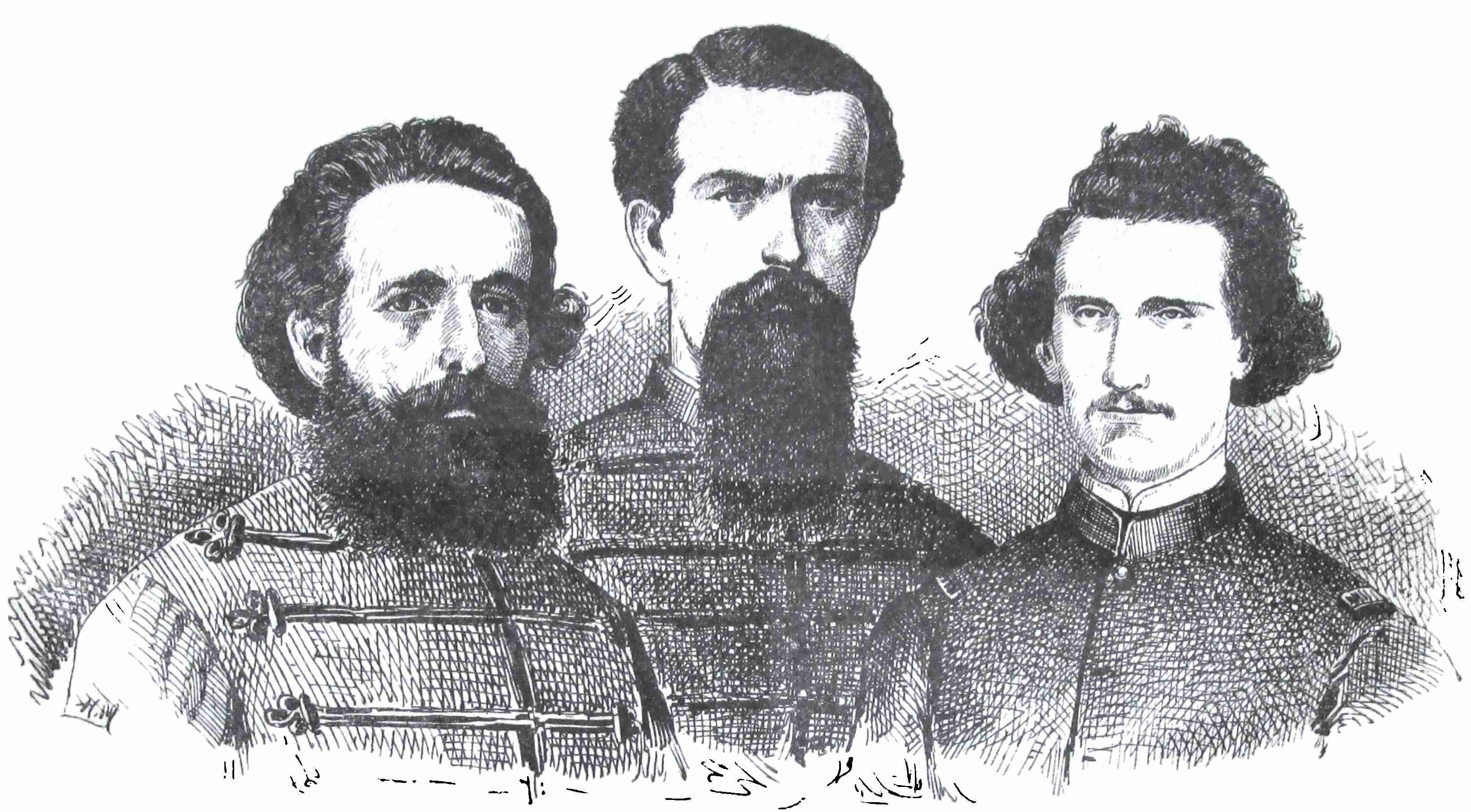 Comandantes Martinez de Hoz, Serrano e Carlos Keen (de la colección de grabados de D. Santiago Priano).